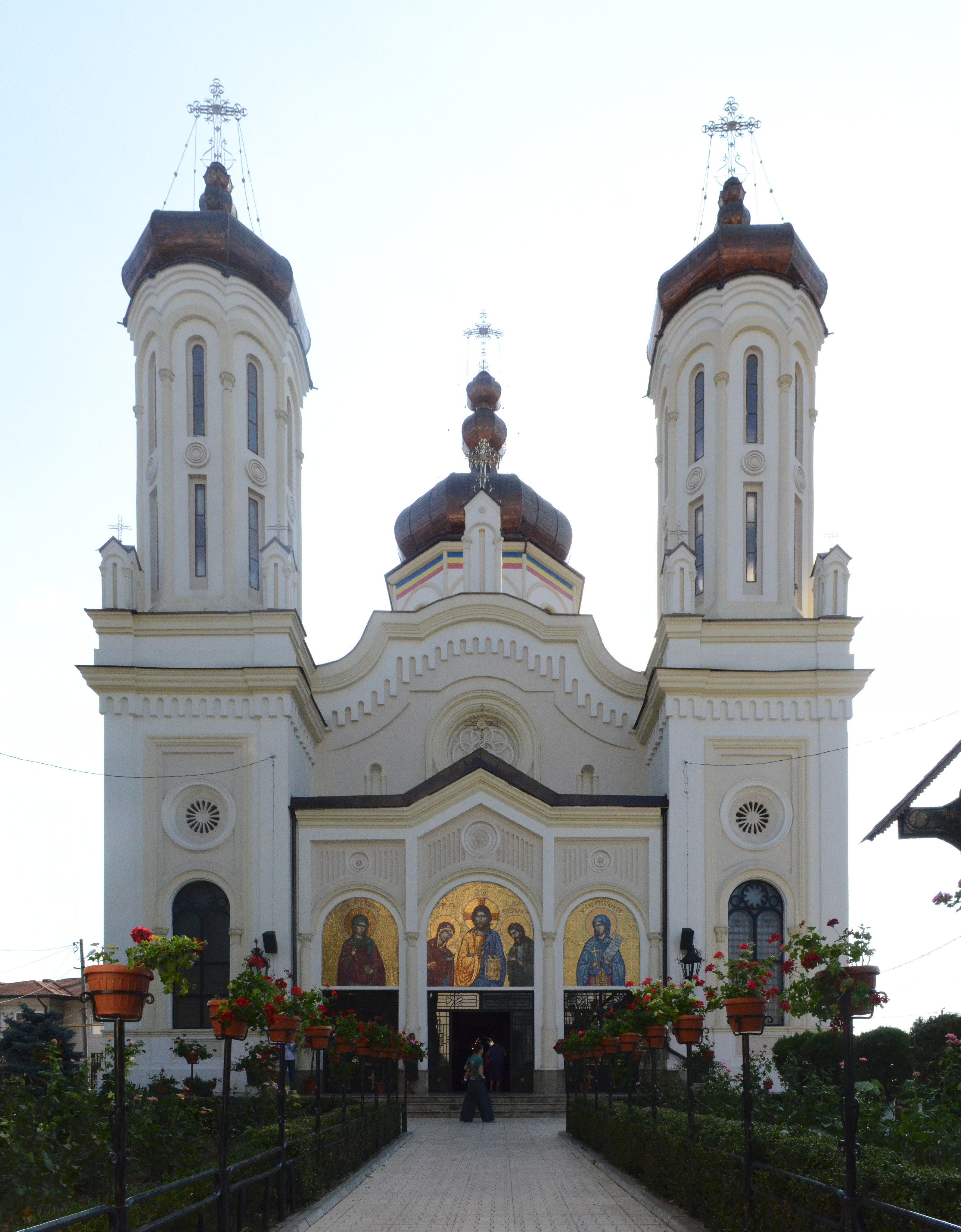 Biserica Sf. Vineri (panoramă din două imagini)